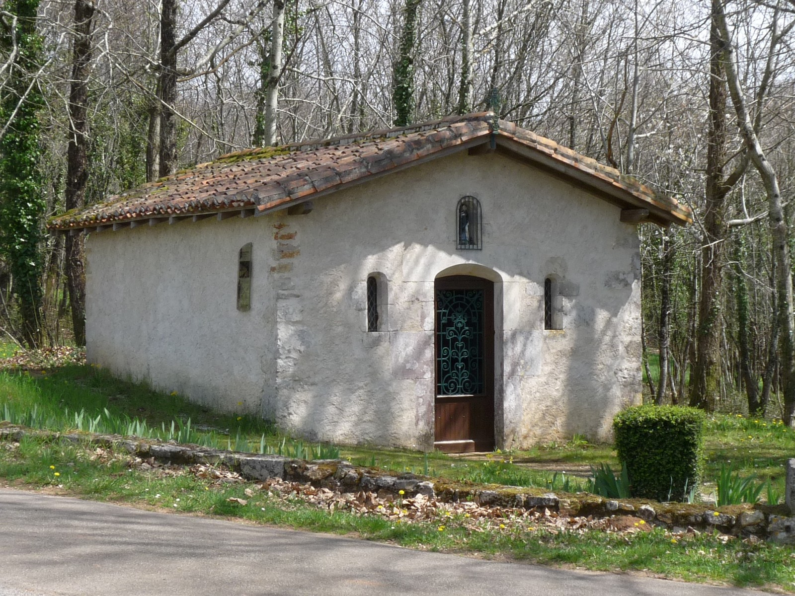 Chapelle St-Roch, St-Sornin, Charente, France